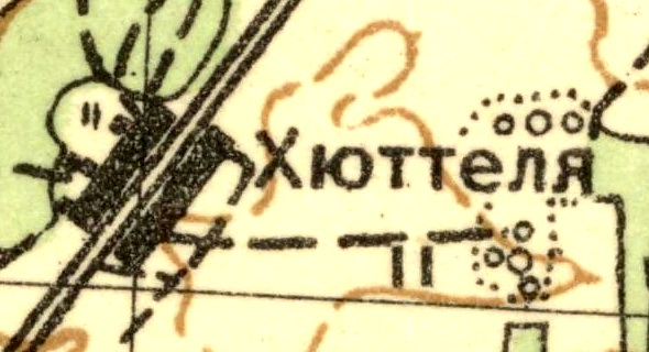 Топографическая карта Ленинградской области, квадрат О-35-12-Г (Ропша), деревня Хюттелево